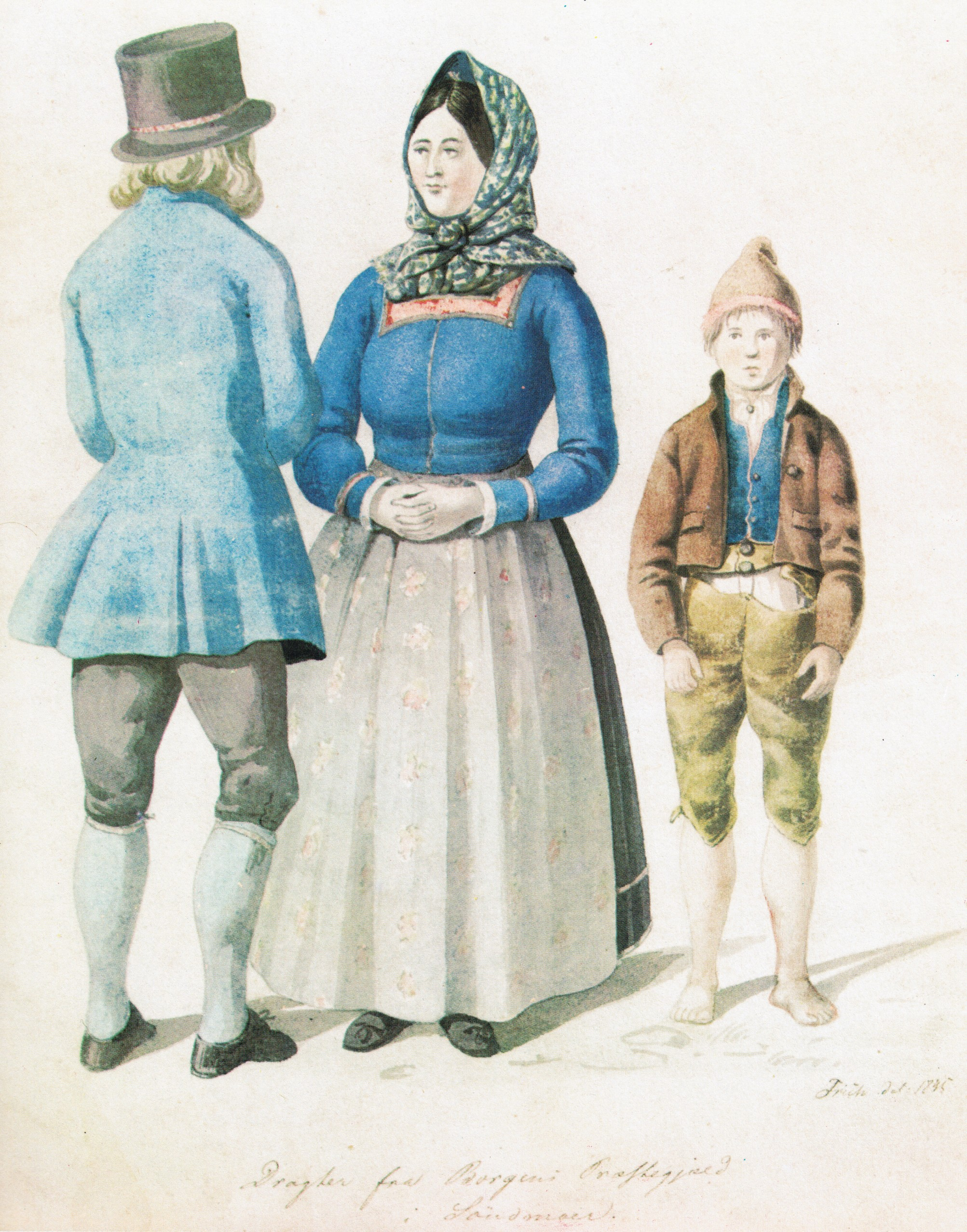 Dragter fra Borgens Præstegjeld i Søndmoer»